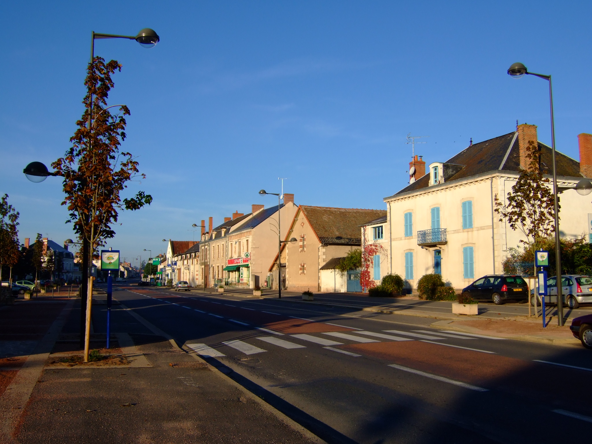 La départementale 943 à Culan - Photo amateur prise par moi-même